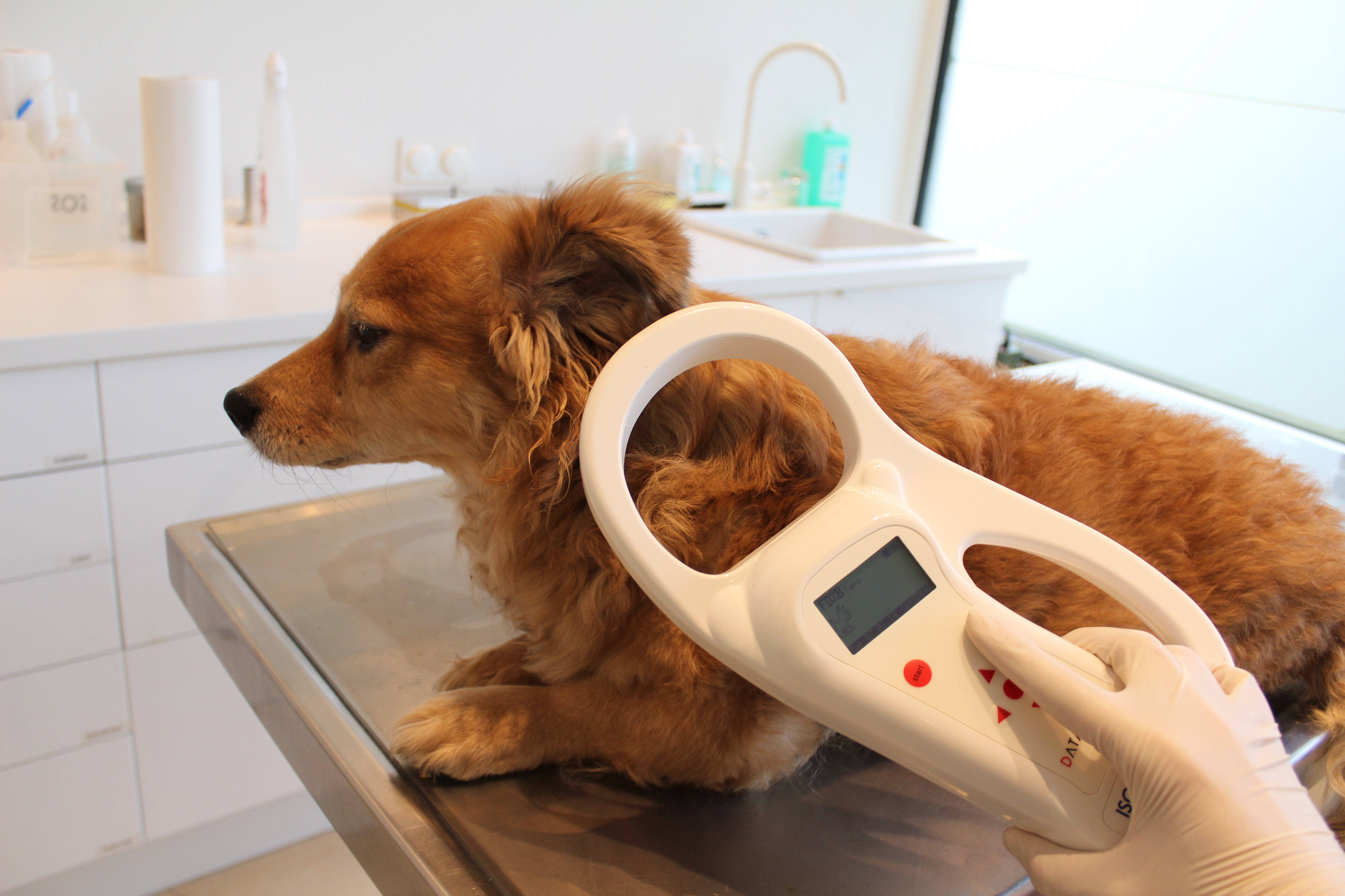 Ablesen eines Mikrotransponders bei einem Hund